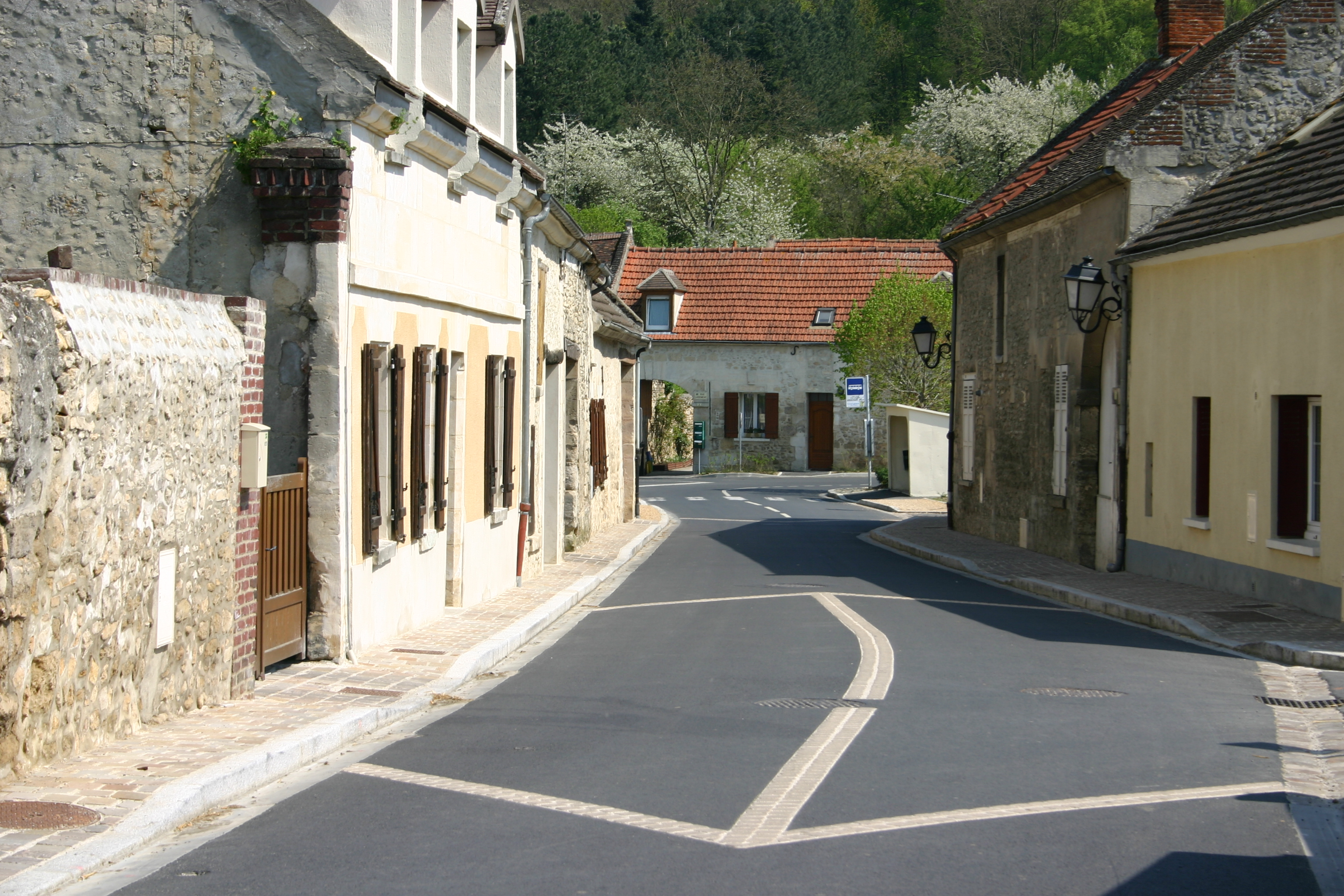 Rue d'Angicourt